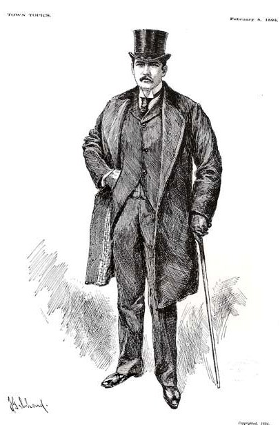 Frederick Gebhard en 1894